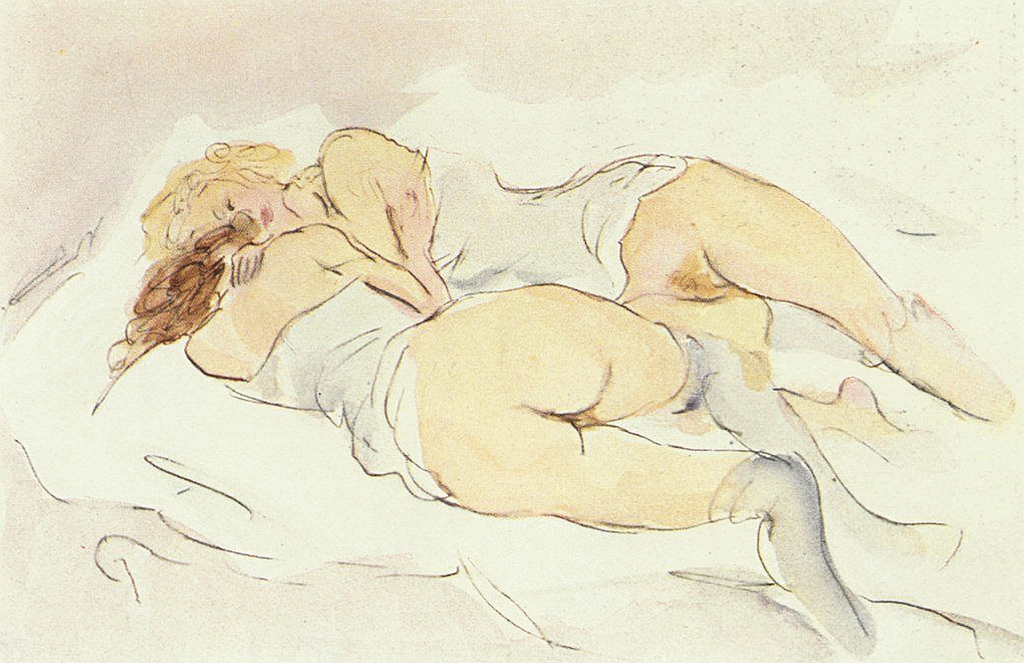 Siesta